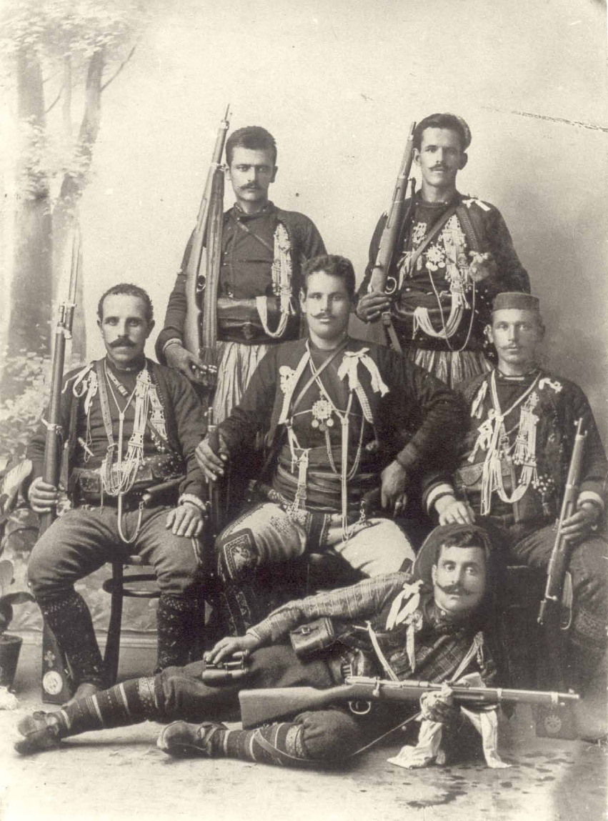 Четата на гъркоманския капитан Лазар Дояма.